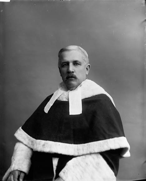 Hon. Désiré Girouard, (Judge Supreme Court of Canada) b. July 7, 1836 - d. Mar. 22, 1911